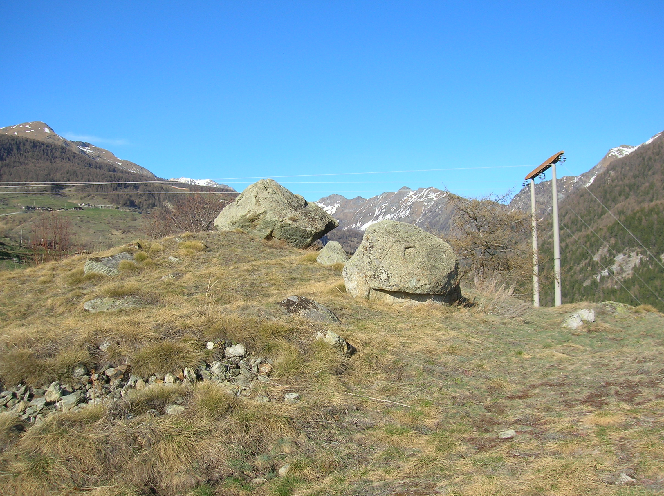 Castelliere superiore di Lignan, comune di Nus, Valle d'Aosta, Italia.